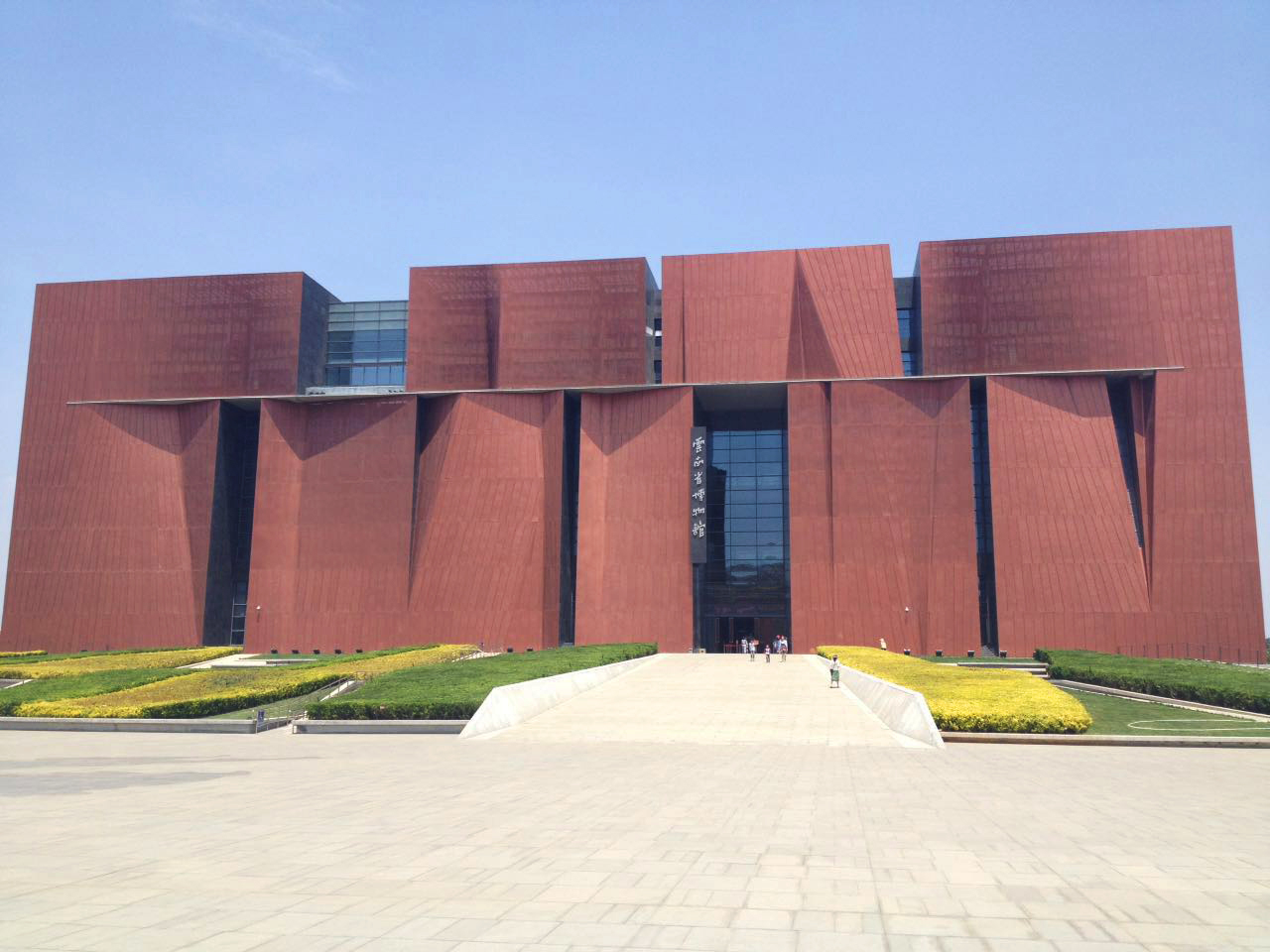 云南省博物馆新馆。